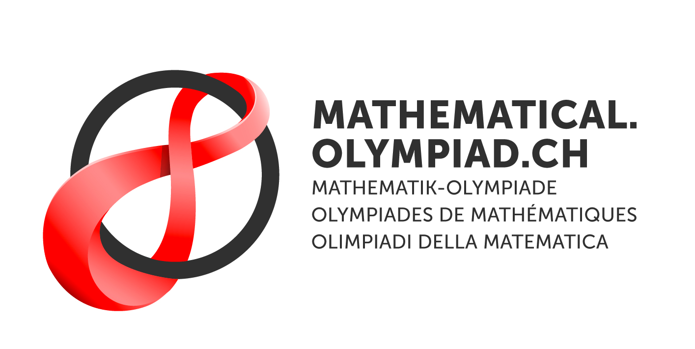 Logo Mathematik 2019